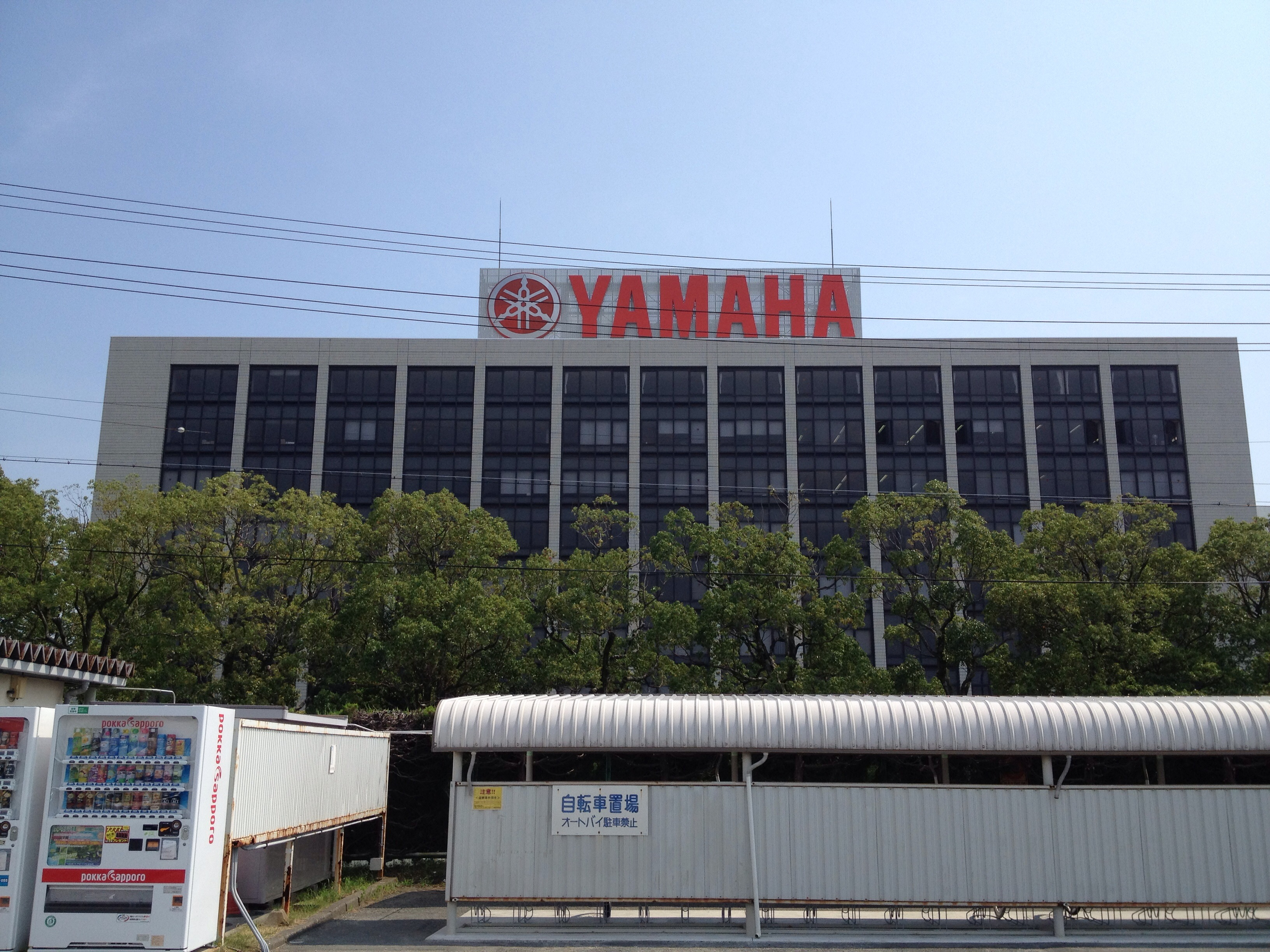 オートバイ駐車禁止